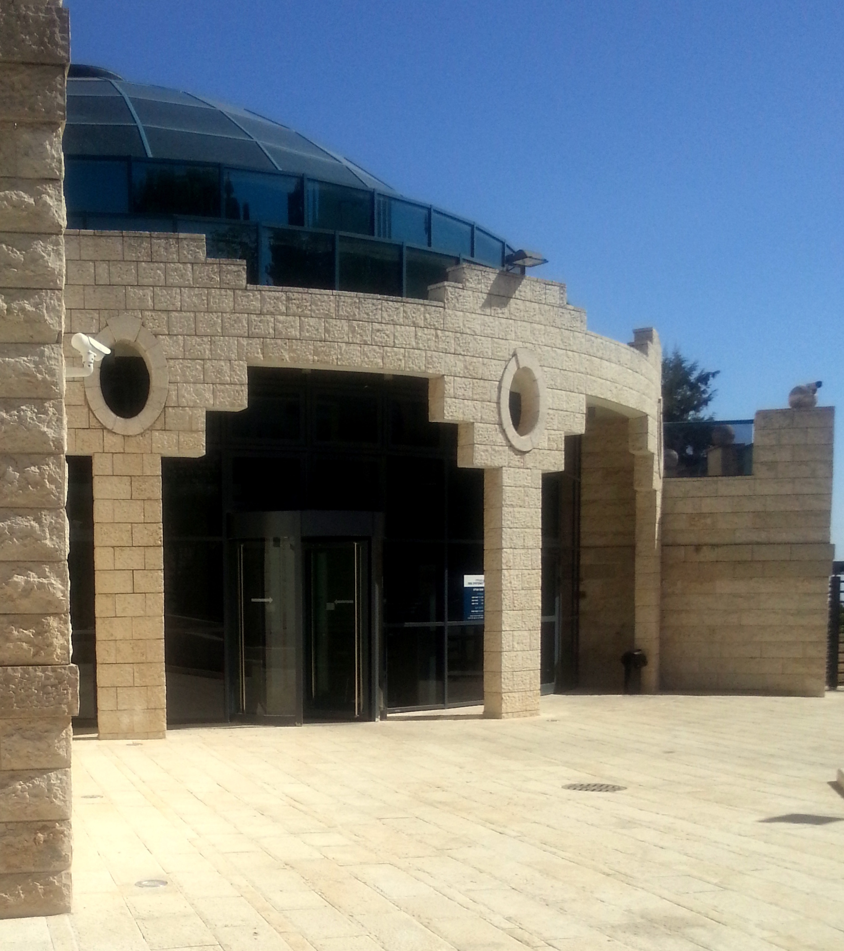 המכללה האקדמית צפת, בניין הספריה